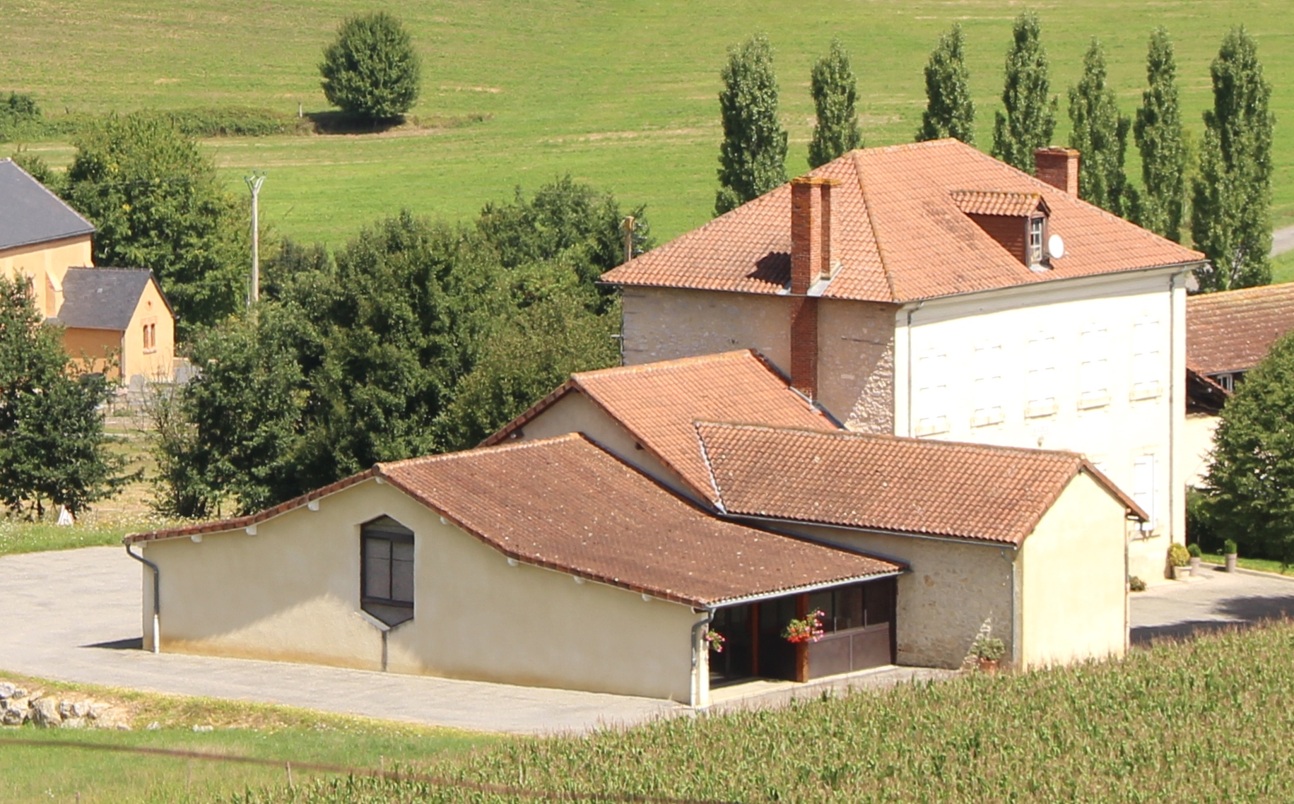 Salle des fêtes de Fréchède (Hautes-Pyrénées)